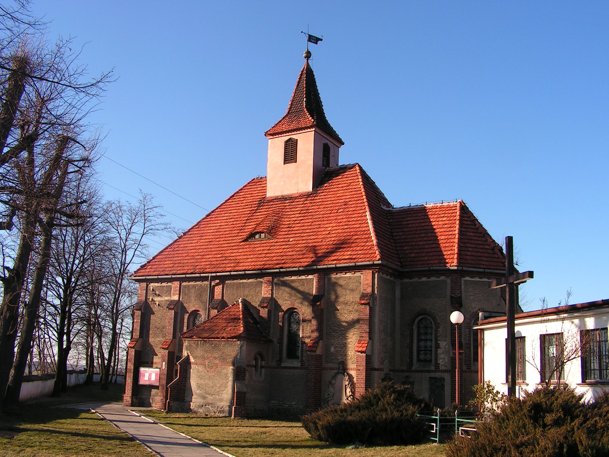 Boleścin, kościół